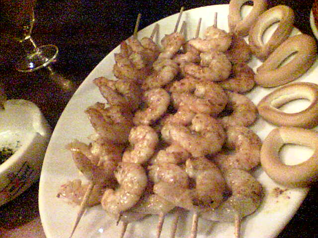 Pinchitos de gambas (prawn pinchos)